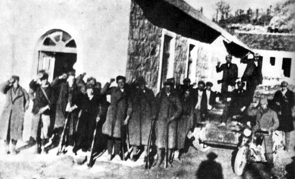 Srpskohrvatski / српскохрватски: Partizanski odred Save Kovačevića kraj tenka zaplijenjenog u borbi sa Italijanima kod Vilusa oktobra 1941. Snimljeno u blizini Osjećenice u proljeće 1942.